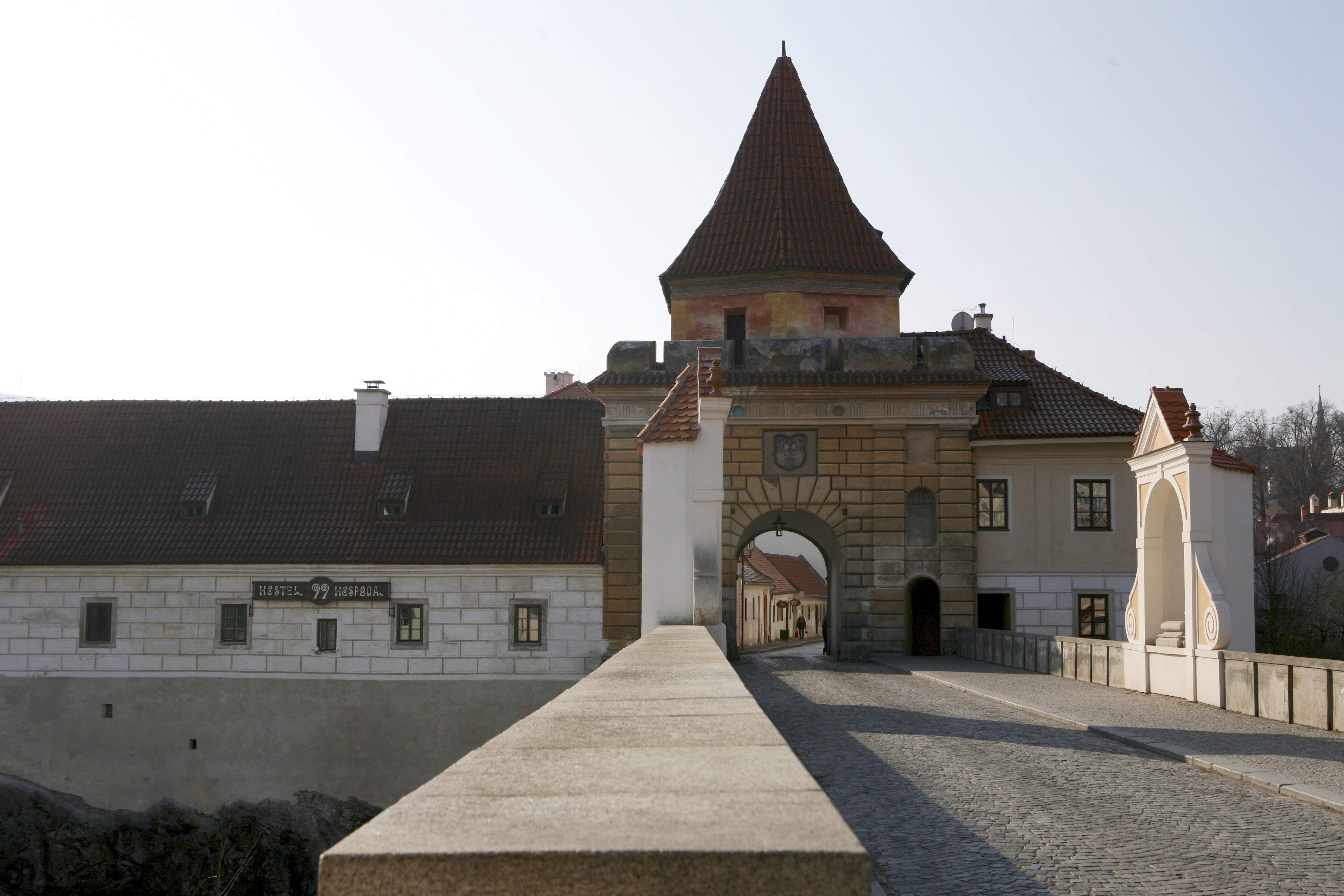 Most k Budějovické bráně Český Krumlov